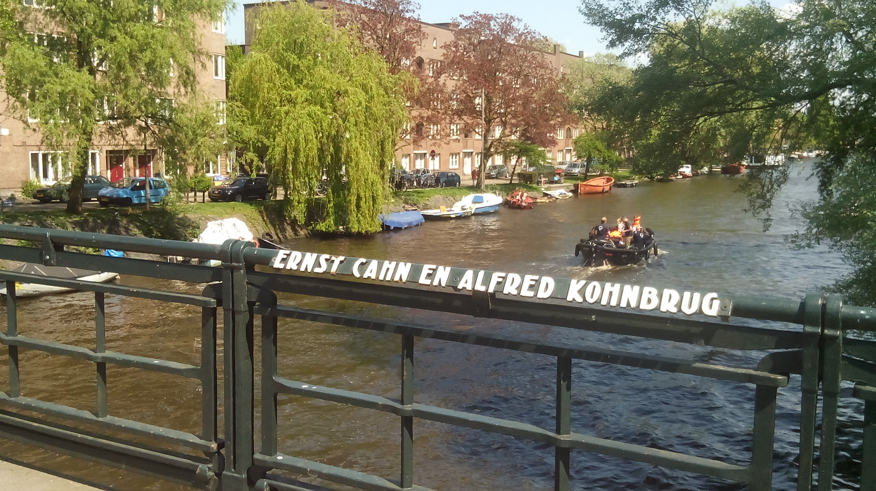 De Ernst Cahn en Alfred Cohn-brug over het Amstelkanaal tussen de Van Woustraat en de Rijnstraat in Amsterdam-Zuid.